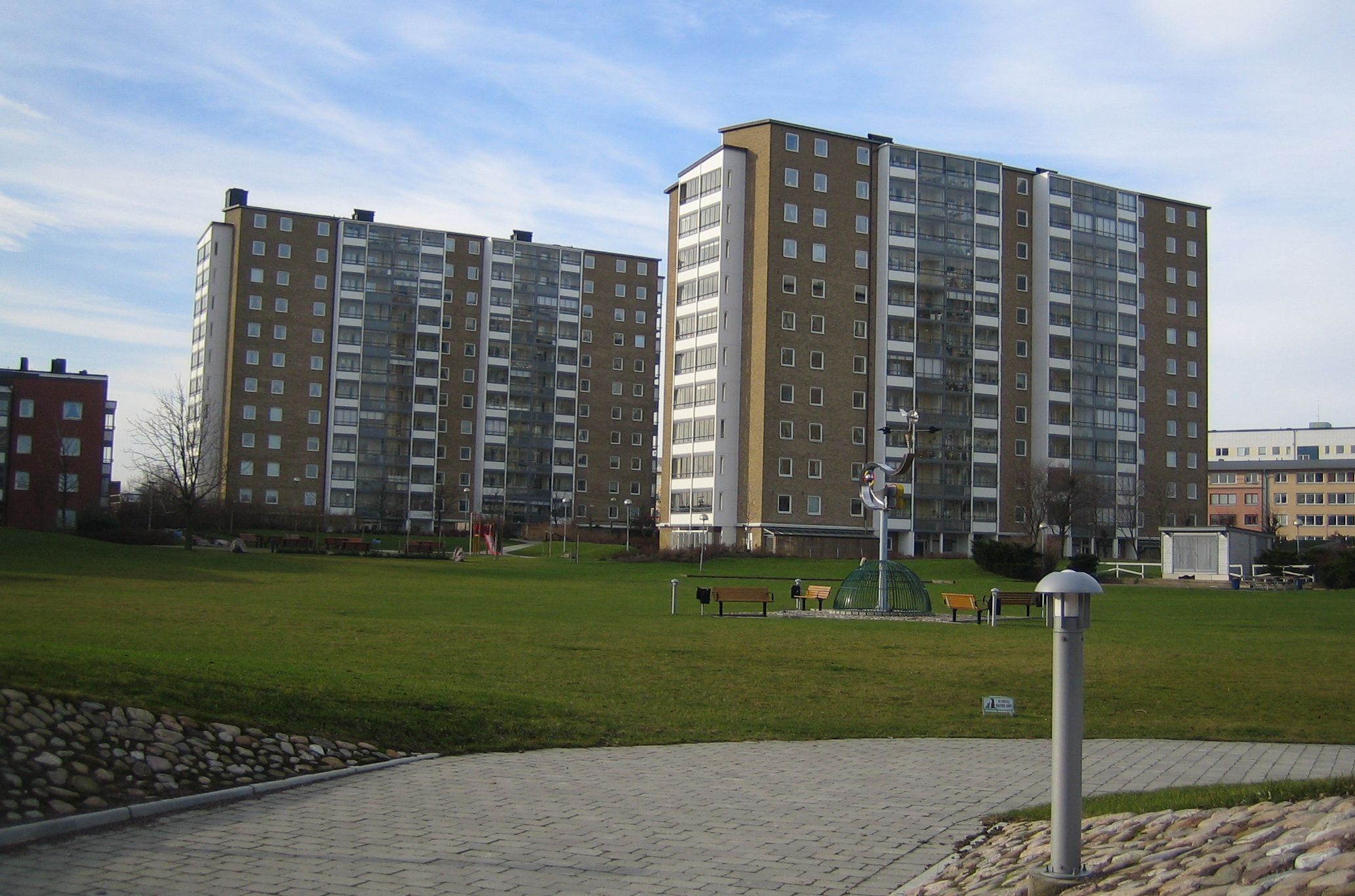 Blekingsborg in Malmö, Sweden.